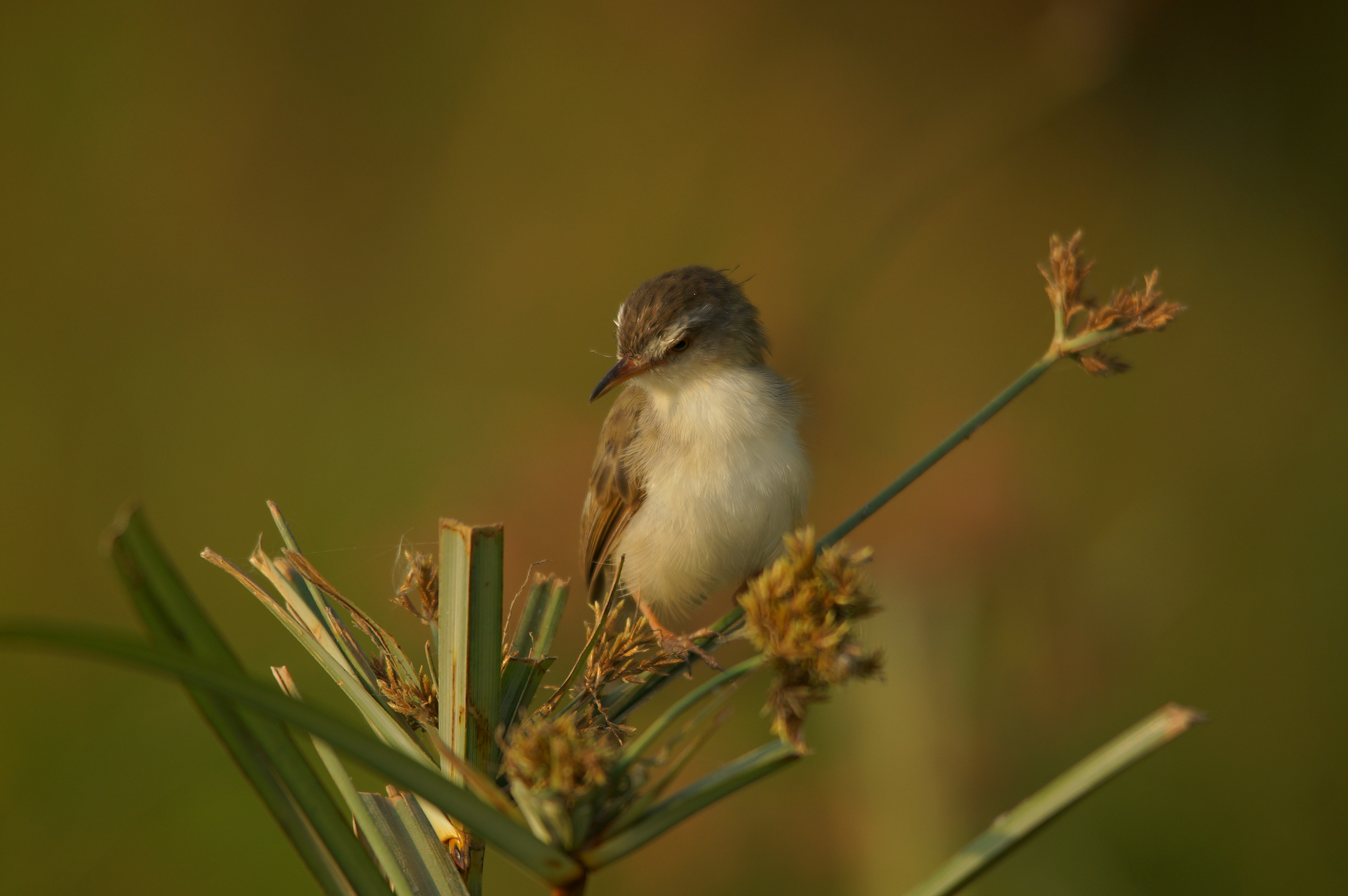 Perenjak padi (Prinia inornata) adalah spesies burung dari keluarga Cisticolidae. Burung penghuni wilayah rawa-rawa gelagah dan padang rumput tinggi ini dalam bahasa Inggris dikenal sebagai Plain Prinia.